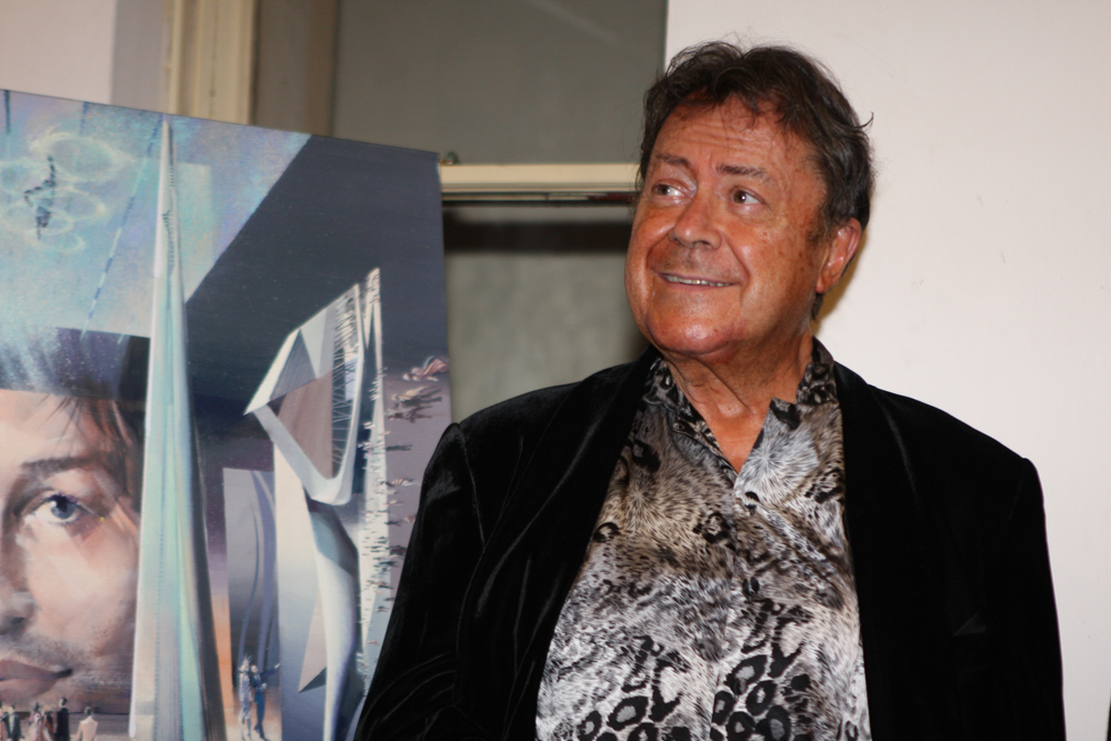 Charles Billich 2012